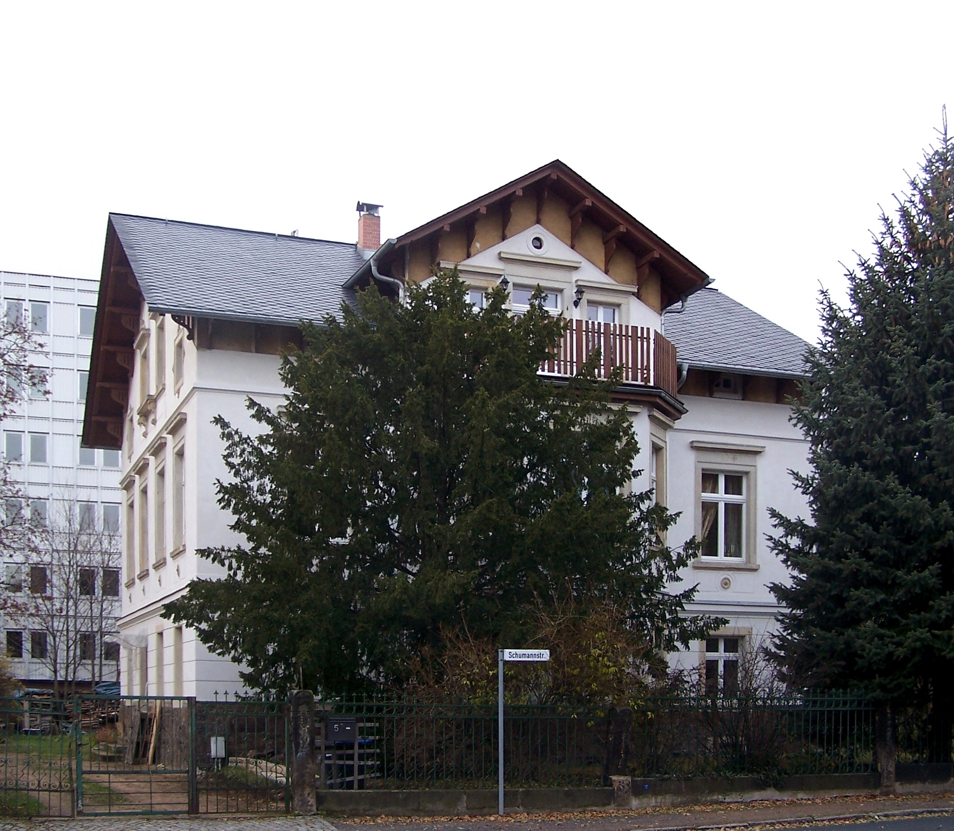 Schumannstr. 5 in Radebeul